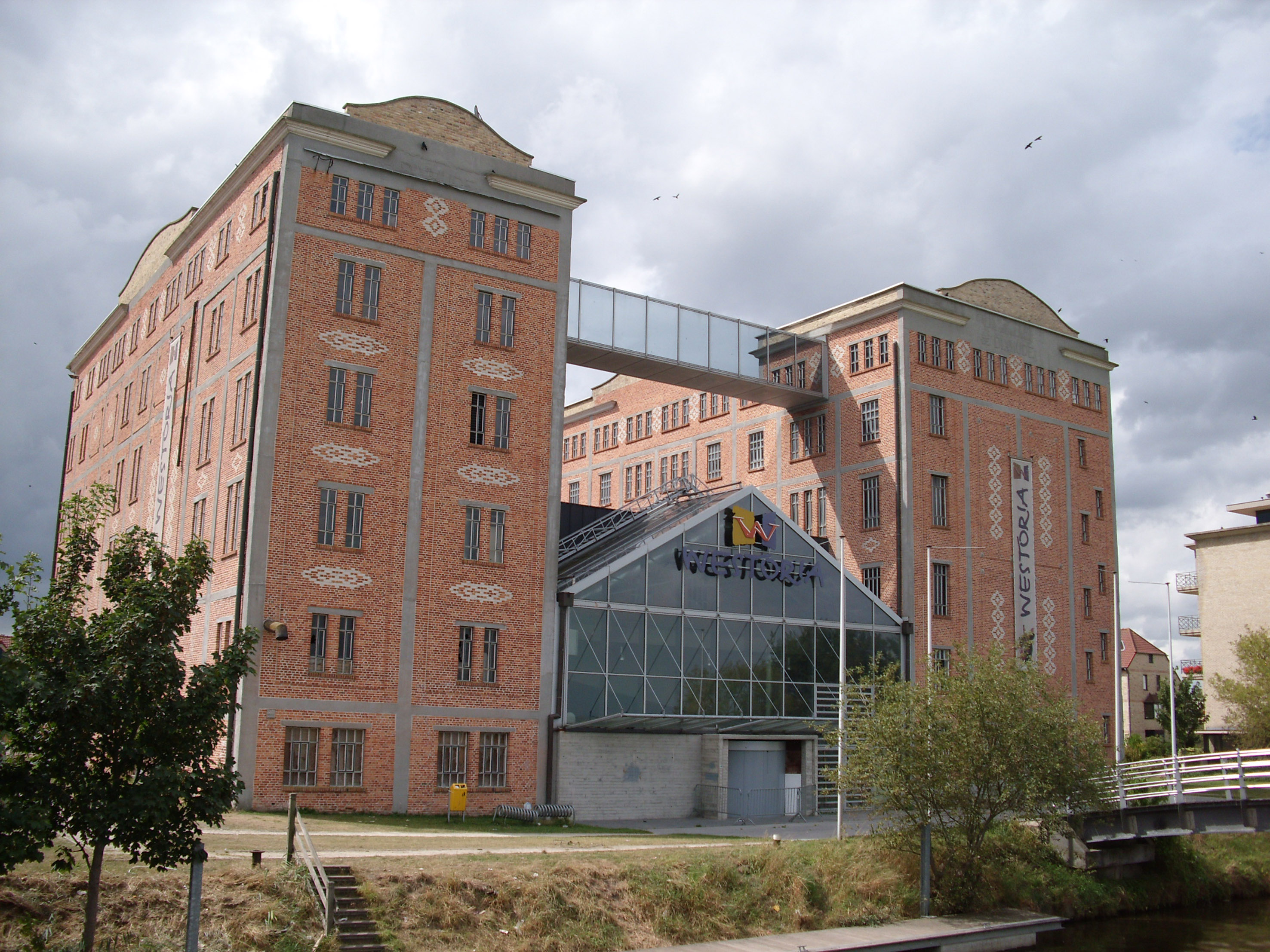 De Oude Bloemmolens van Diksmuide - van 2000 tot 2003 was er binnen het museum Westoria gevestigd, waar men op interactieve manier kennis kon maken met de geschiedenis van West-Vlaanderen.